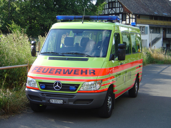 Ein Feuerwehrfahrzeug der Feuerwehr der Stadt Zürich in Albisrieden.